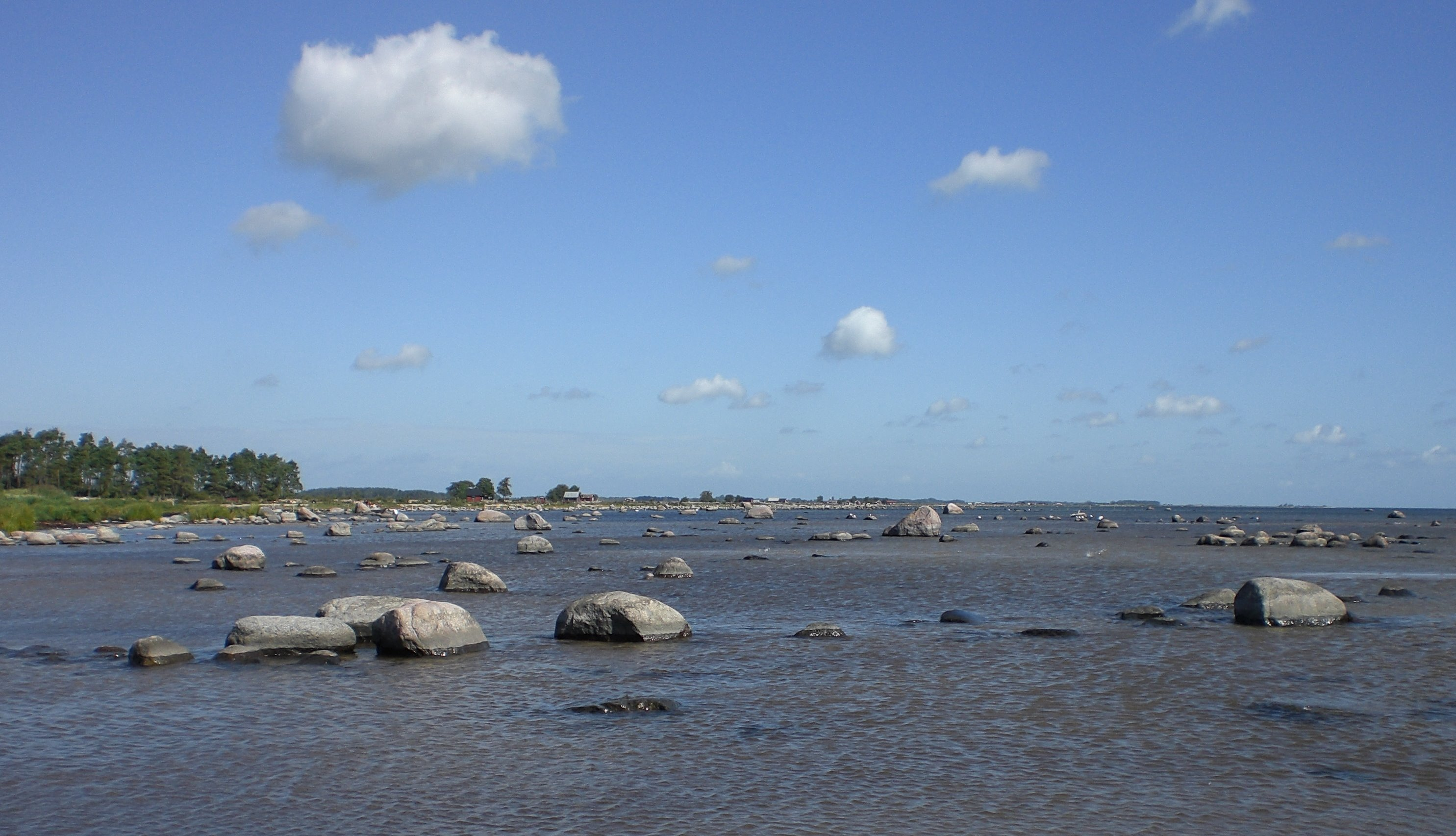 Melösaviken, Ostseebucht auf der Insel Öland, Blick nach Norden